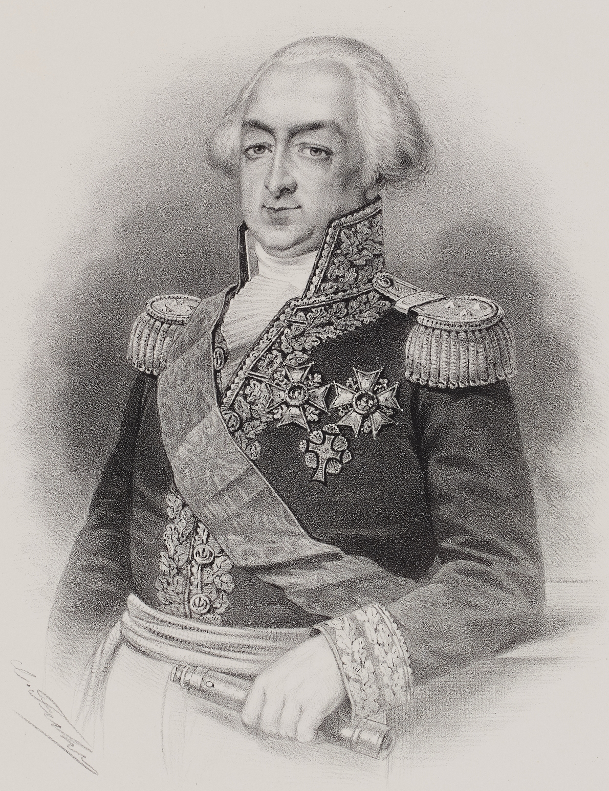 Portrait de François Étienne de Rosily-Mesros, vice-amiral. Gravure du XIXTemplate:Ème siècle